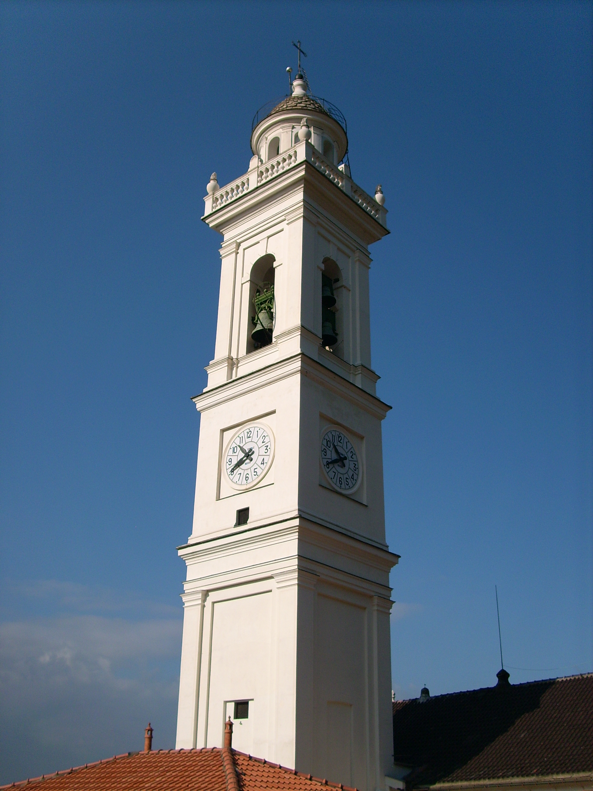 Campanile della chiesa di San Lorenzo, Cogorno, Liguria, Italy